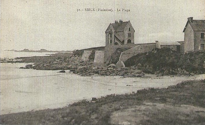 Île de Sieck : plage et maisons à la pointe ouest de l'île au début du XXème siècle (carte postale, origine inconnue)